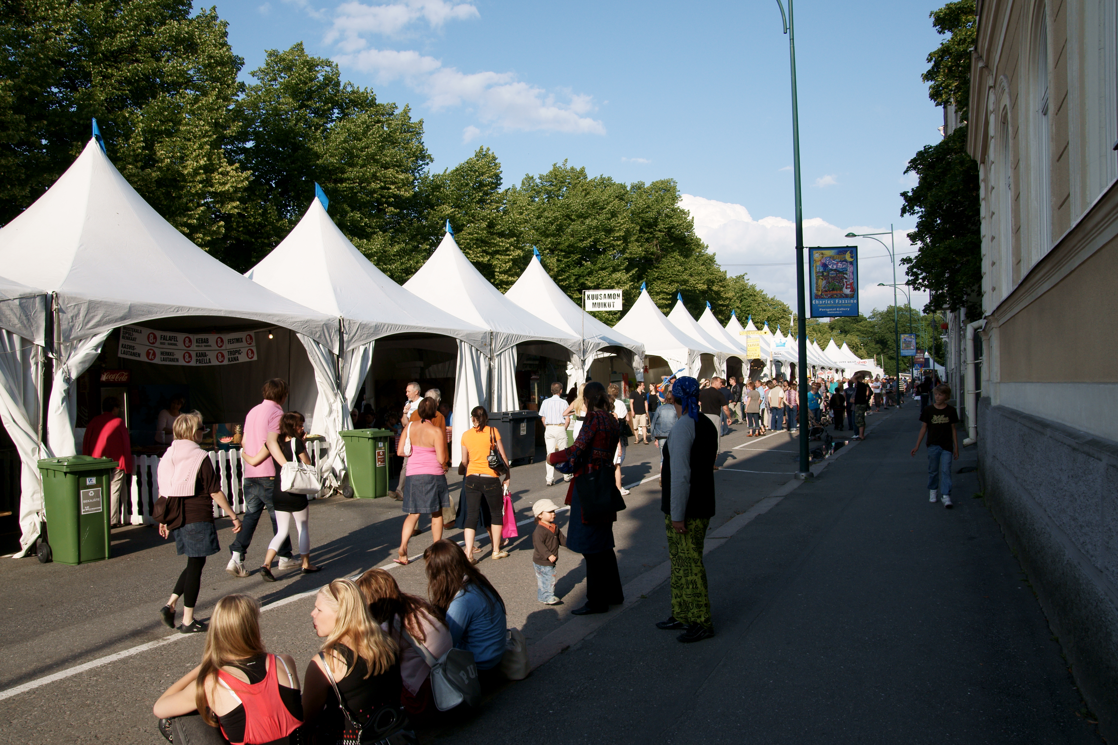 Jazzkatua Porissa 2009.